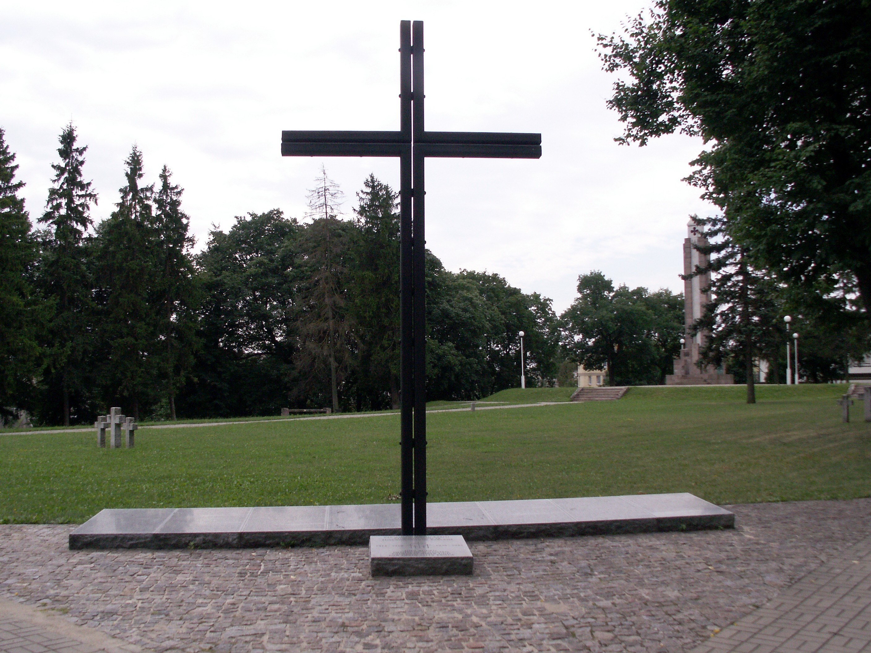 Kriegsgräberstätte Sukilėlių kalnelis, Šiauliai